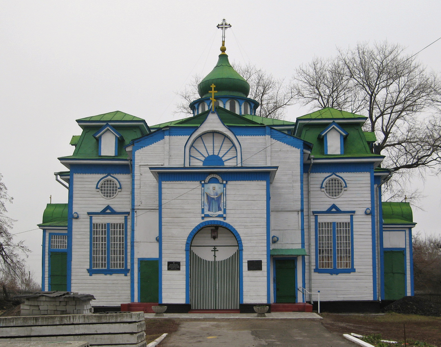 Дерев'яна Покровська церква кінця 19-початку 20ст., с.Берестовенька, Красноградський р-н., Харківська обл.